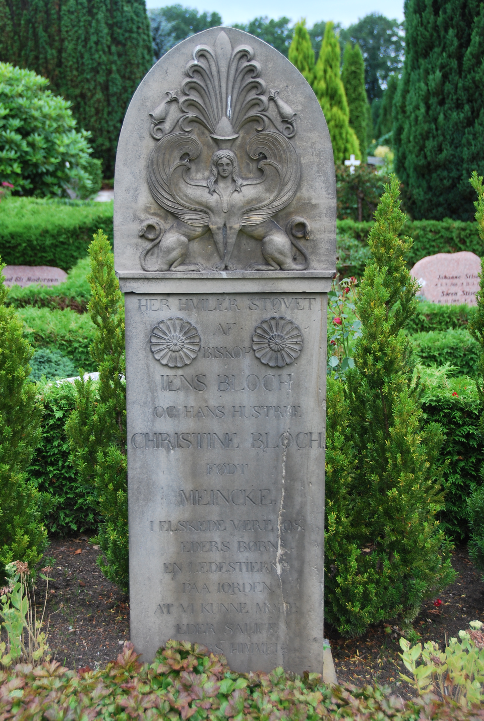 Gravsten for biskop Jens Bloch og hustru Christine. Placeret på Viborg Kirkegård.